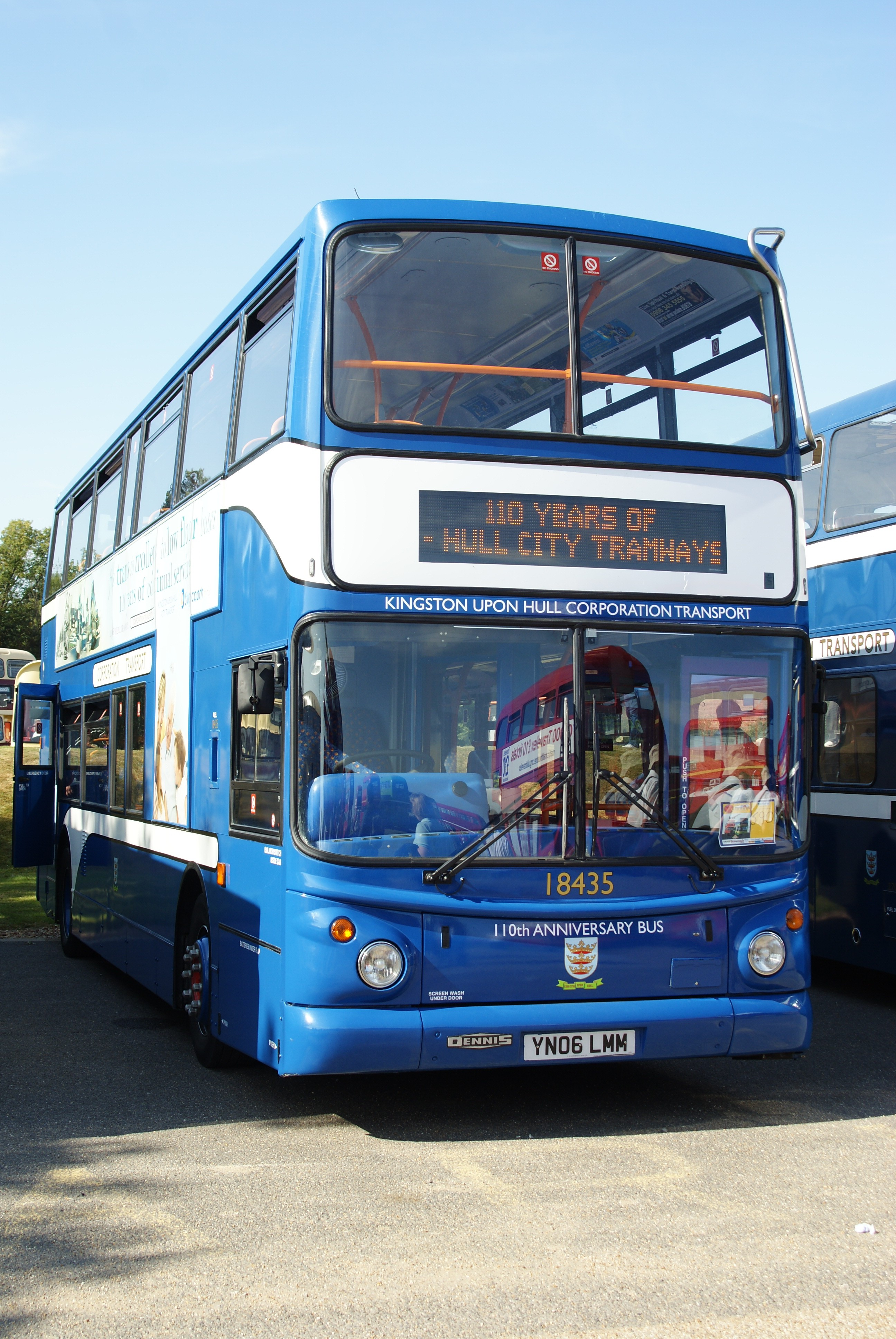 YN06LMM 270909 CPS